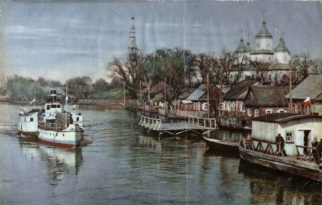 Беларуская (тарашкевіца): Давыд-Гарадок (Davyd-Haradok), рака Гарынь (Haryń)